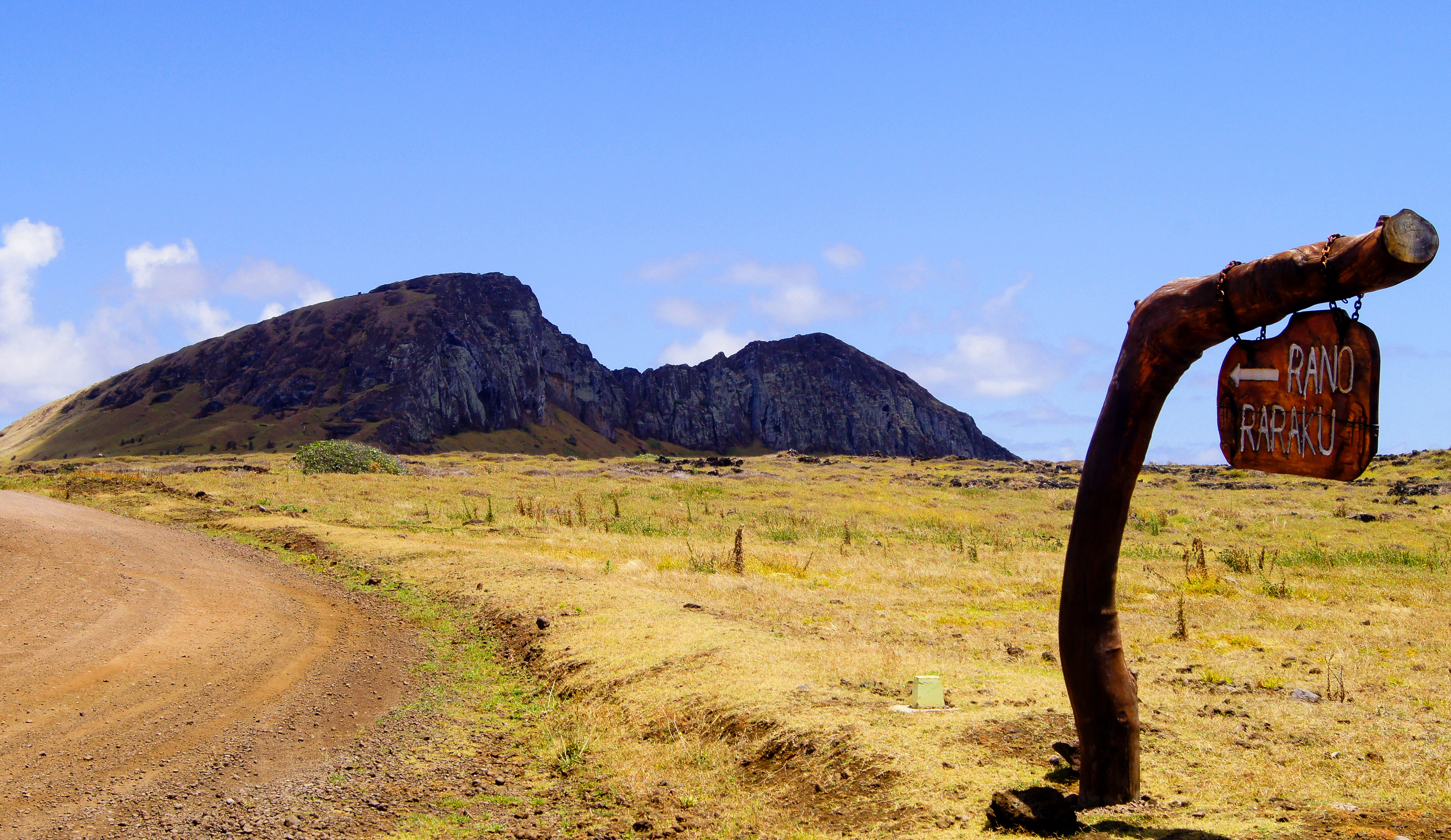 Foto realizada desde un auto, el letrero indica el nombre del colosal volcán de fondo, el Rano Raraku, lugar donde se tallaban los enormes Moais. This is a photo of a national monument in Chile: 628